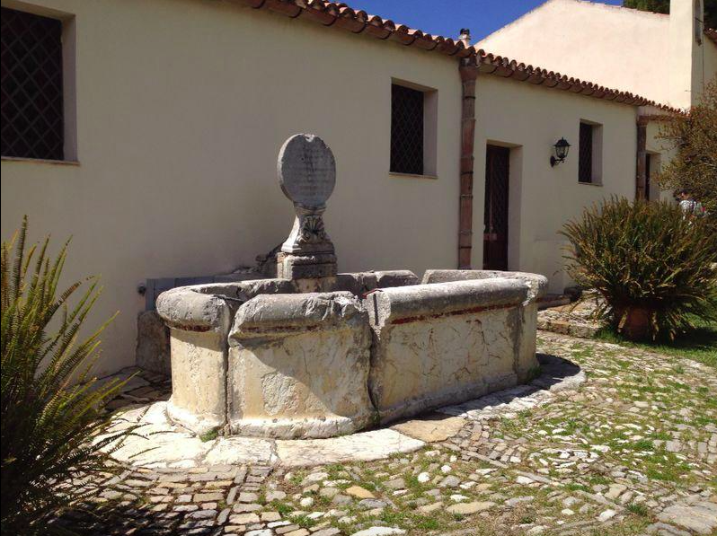 Storica fontana in pietra locale, masseria Rossella, Piana degli Albanesi (PA).